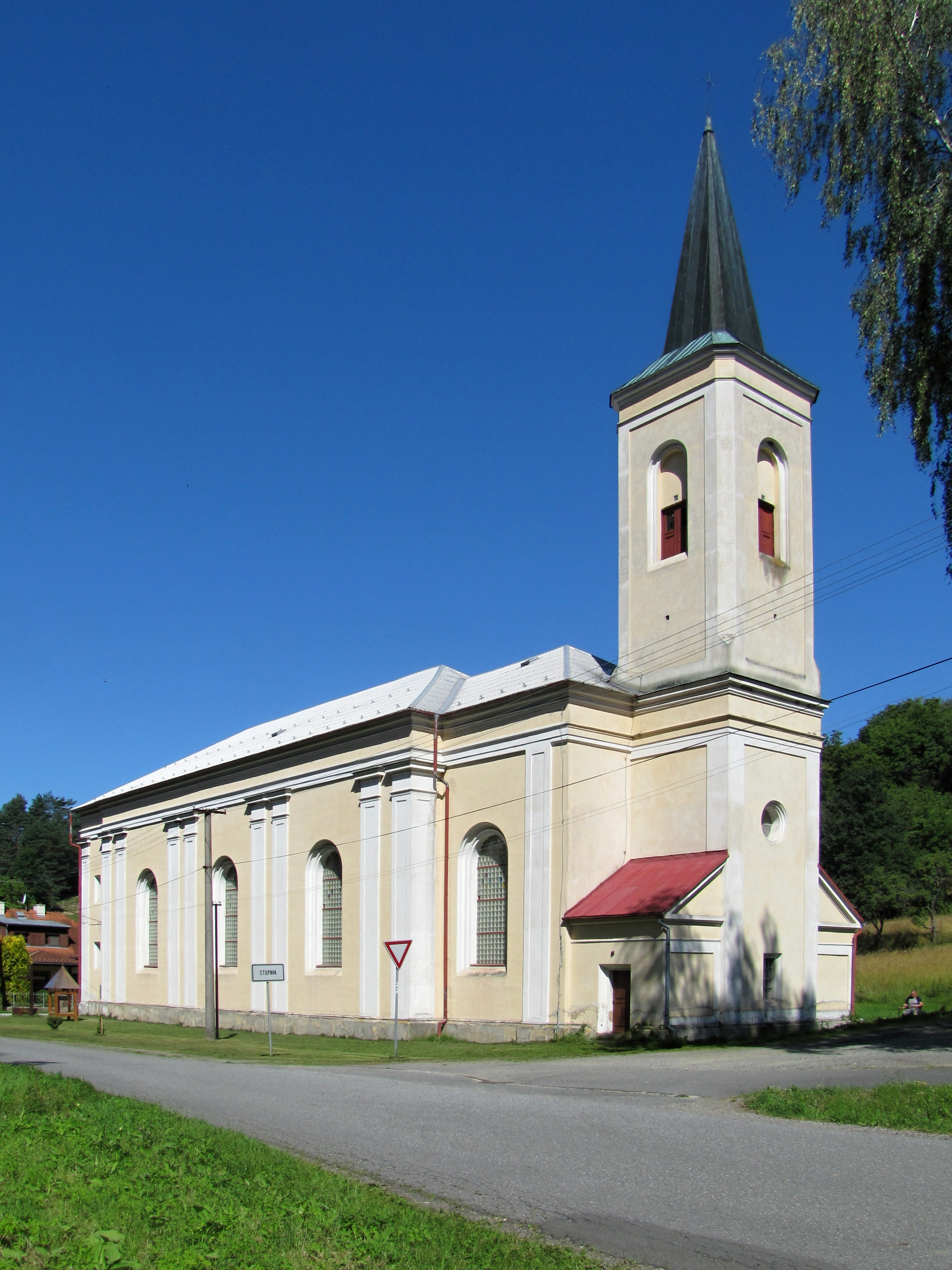 Kostel sv. Klimenta na Stupavě